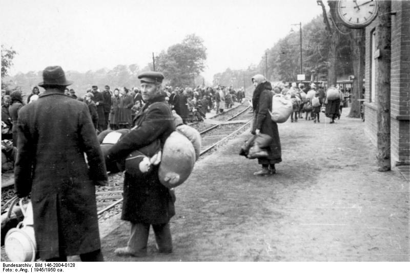 Ankunft von Flüchtlingen aus Ostpr. in Schleswig-Holstein (Bahnhof Meldorf).